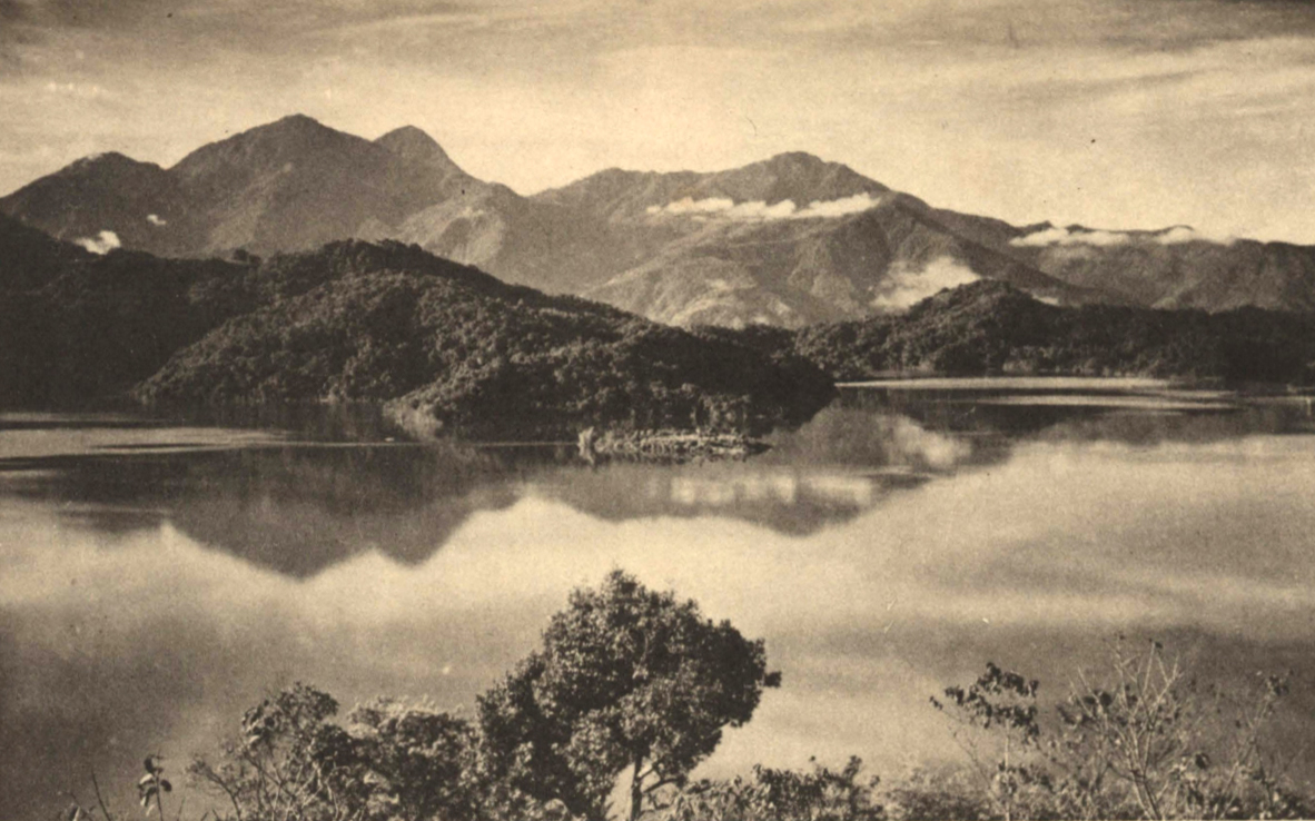 日治時期日月潭景觀